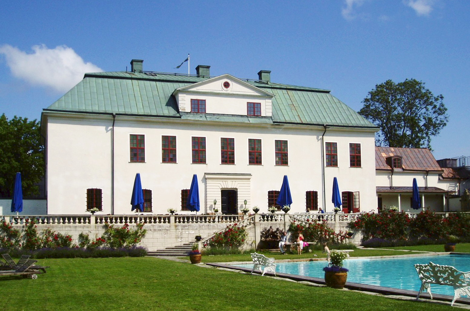 Häringe slott, Södermanland